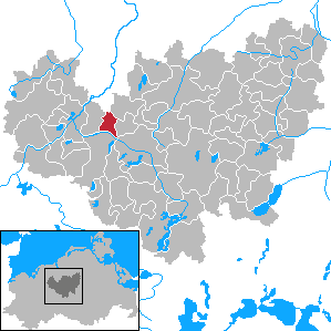 Groß Schwiesow in Mecklenburg-Vorpommern - District Güstrow